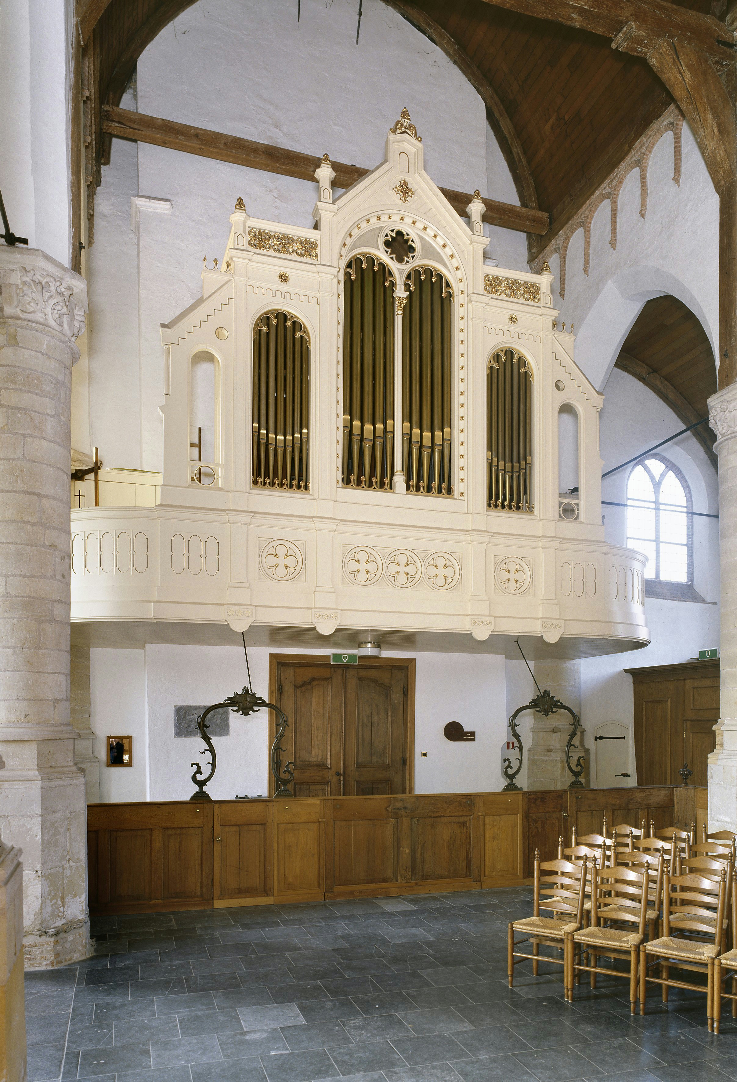 Nederlands Hervormde Kerk: Intenieur, aanzicht orgel, orgelnummer 484 (opmerking: Gefotografeerd voor Het Historische Orgel in Nederland 1872-1878, bladzijde 146)